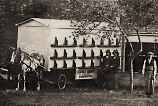 Ausschnitt aus einer Werbepostkarte der Großimkerei des österreichisch-ungarischen Imkers Leopold Gombocz (1875–1943) aus dem Jahr 1909. Das ursprüngliche Foto zeigt eine Teilansicht des Hofes/Imkereibetriebes von Gombocz in Laafeld bei Radkersburg (Steiermark; heutige Adresse: Laafeld 76–77, Bad Radkersburg). Der davon erstellte Ausschnitt zeigt einen beiden ersten von Gombocz entwickelten und angefertigten, speziellen Bienenwagen für jeweils 54 Bienenvölker, und zwar den im Originalbild rechts stehenden Wagen mit Pferdegespann. Außerdem sind folgende Personen zu sehen: zwei unbekannte Fuhrleute und ein weiterer, unbekannter Mitarbeiter der Imkerei von Gombocz.